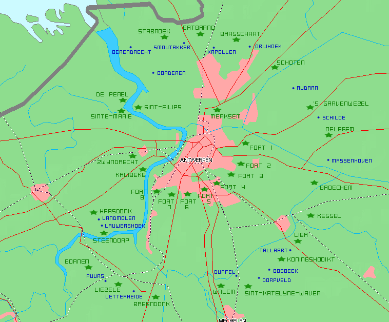 Schematische voorstelling van de verschillende forten(gordels) rond Antwerpen. Groen zijn de forten, blauw zijn de redoutes of schansen.